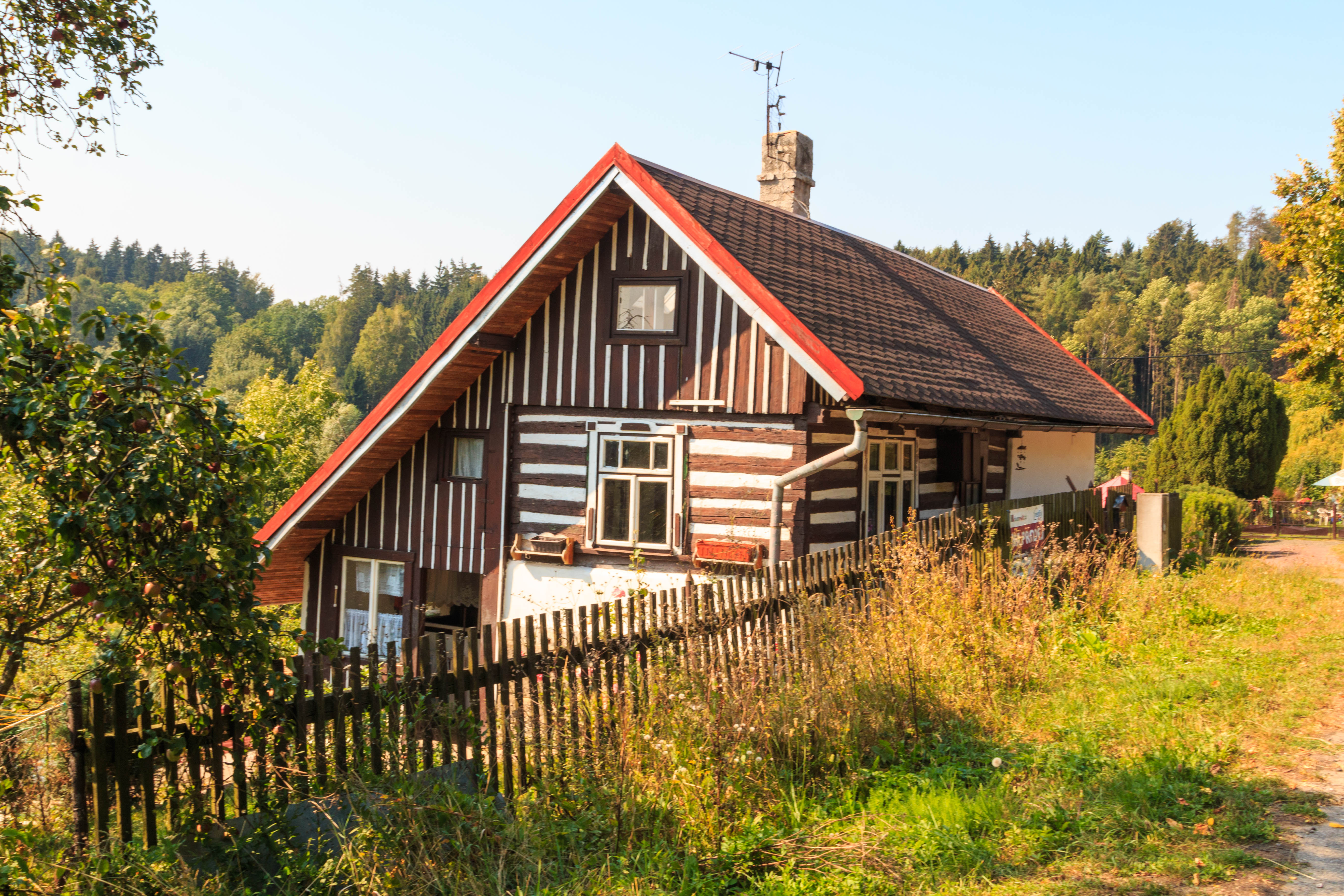 Březka u Libuně - čp. 7